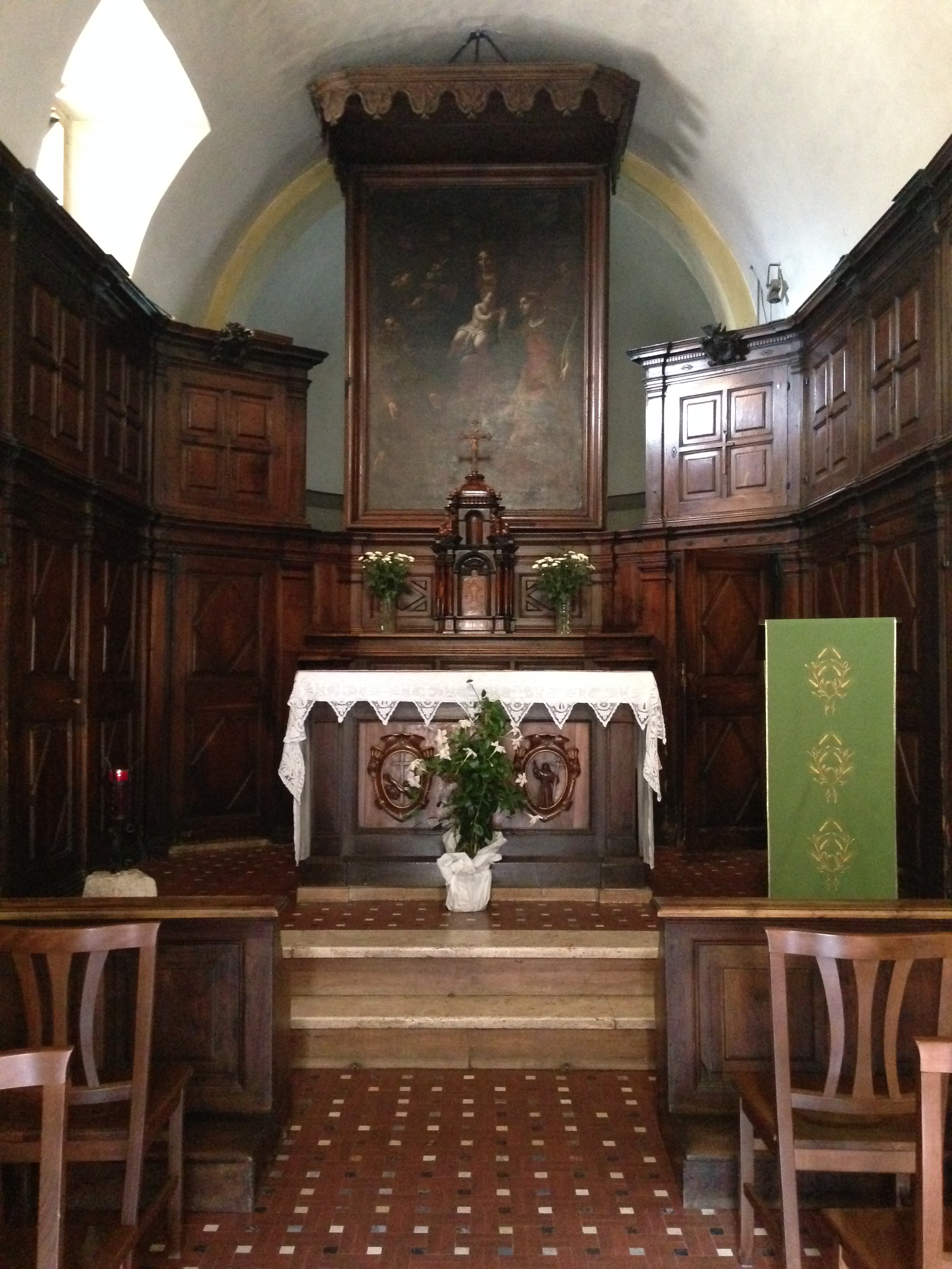 Eremo francescano. Monteluco di Spoleto